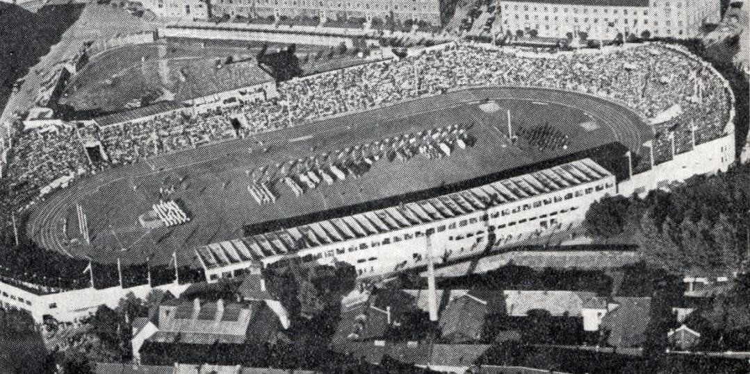 Championnats d'Europe d'athlétisme à Oslo en 1946 - Le Bislett stadion d'Oslo. L'Athlétisme : organe officiel de la Fédération française d'athlétisme - 1er septembre 1946.